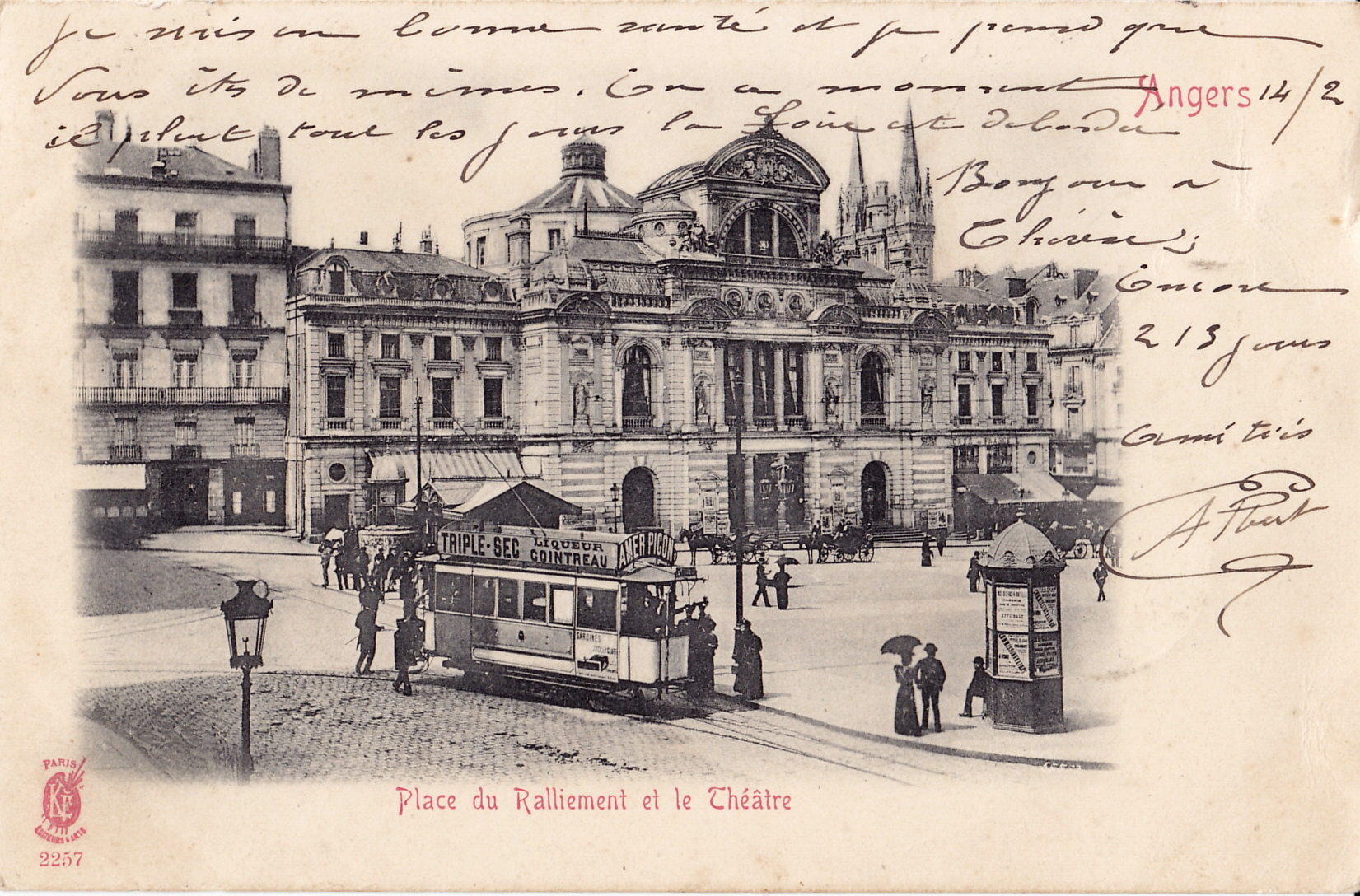 Carte postale ancienne éditée par KF à Paris, n°2257 : ANGERS - Place du Ralliement et le Théatre